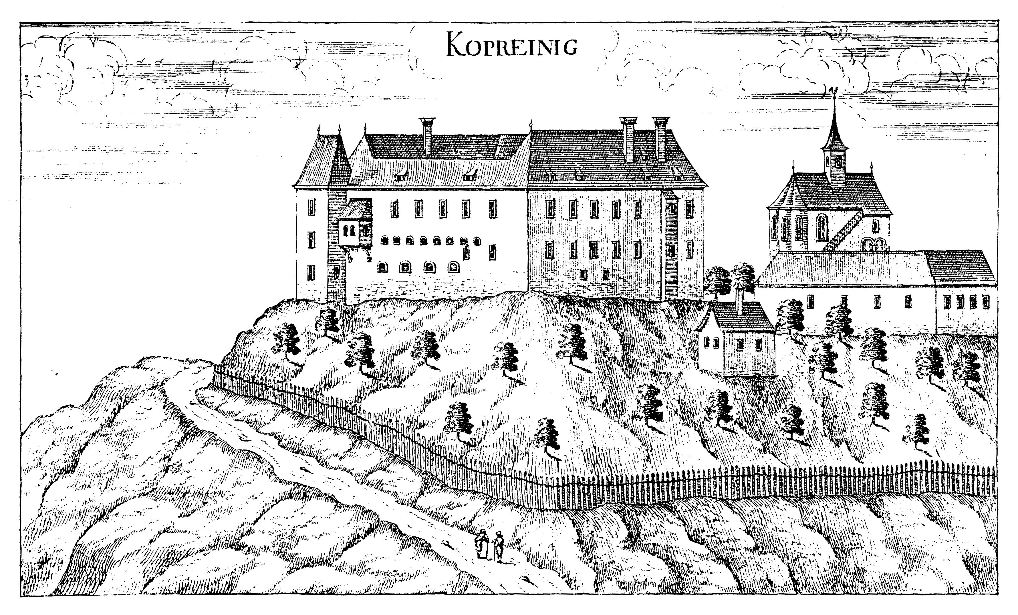 Schloss Kopreinig (bei St. Ulrich in Greith), Weststeiermark, Österreich: Abbildung (Blick Richtung Süden, der Weg links ist die heutige Landesstraße) aus: Georg Matthäus Vischer: Topographia Ducatus Stiriae, 1681. Kopie aus: Werner Murgg, Bernhard Hebert: Mittelalterliche und Frühneuzeitliche Wehrbauten im Bezirk Deutschlandsberg: Aufnahme der Bodendenkmale. Mit Zeichnungen von Stefan Karl. Beiträge zur Mittelalterarchäologie in Österreich BMÖ. Band 10, Jahrgang 1994. Hrsg: Österreichische Gesellschaft für Mittelalterarchäologie ÖGM, Wien. ISSN 1011-0062. S. 93.